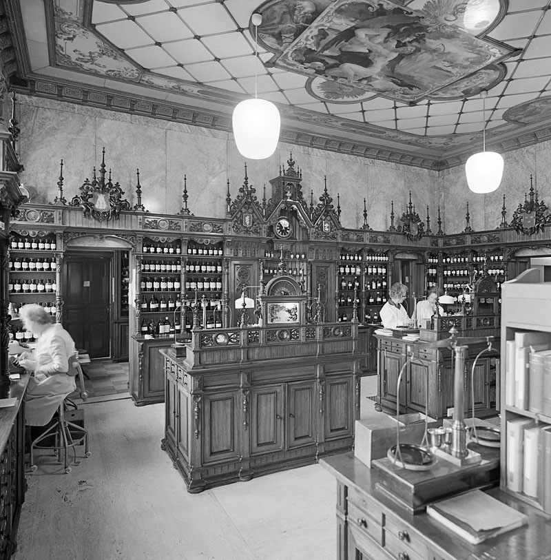 Apoteket Storken, interiör. Kvarteret STYRMANNEN. Storgatan 28. Östermalm.